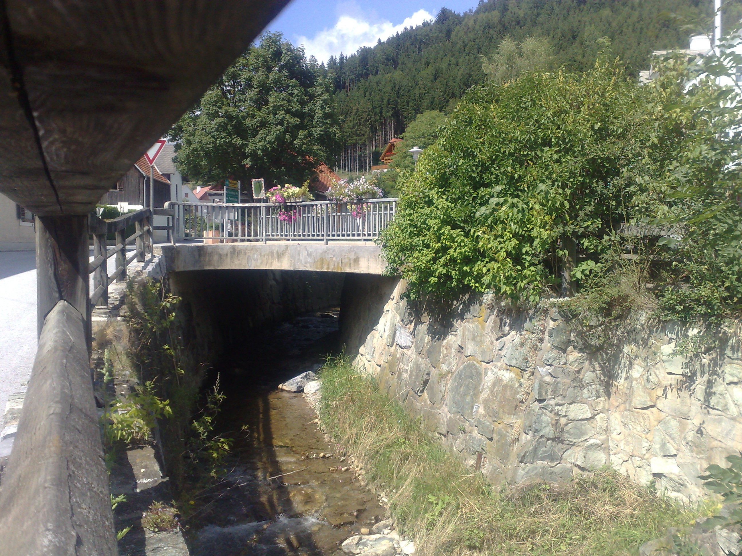 A Rába és hídja Passailnál